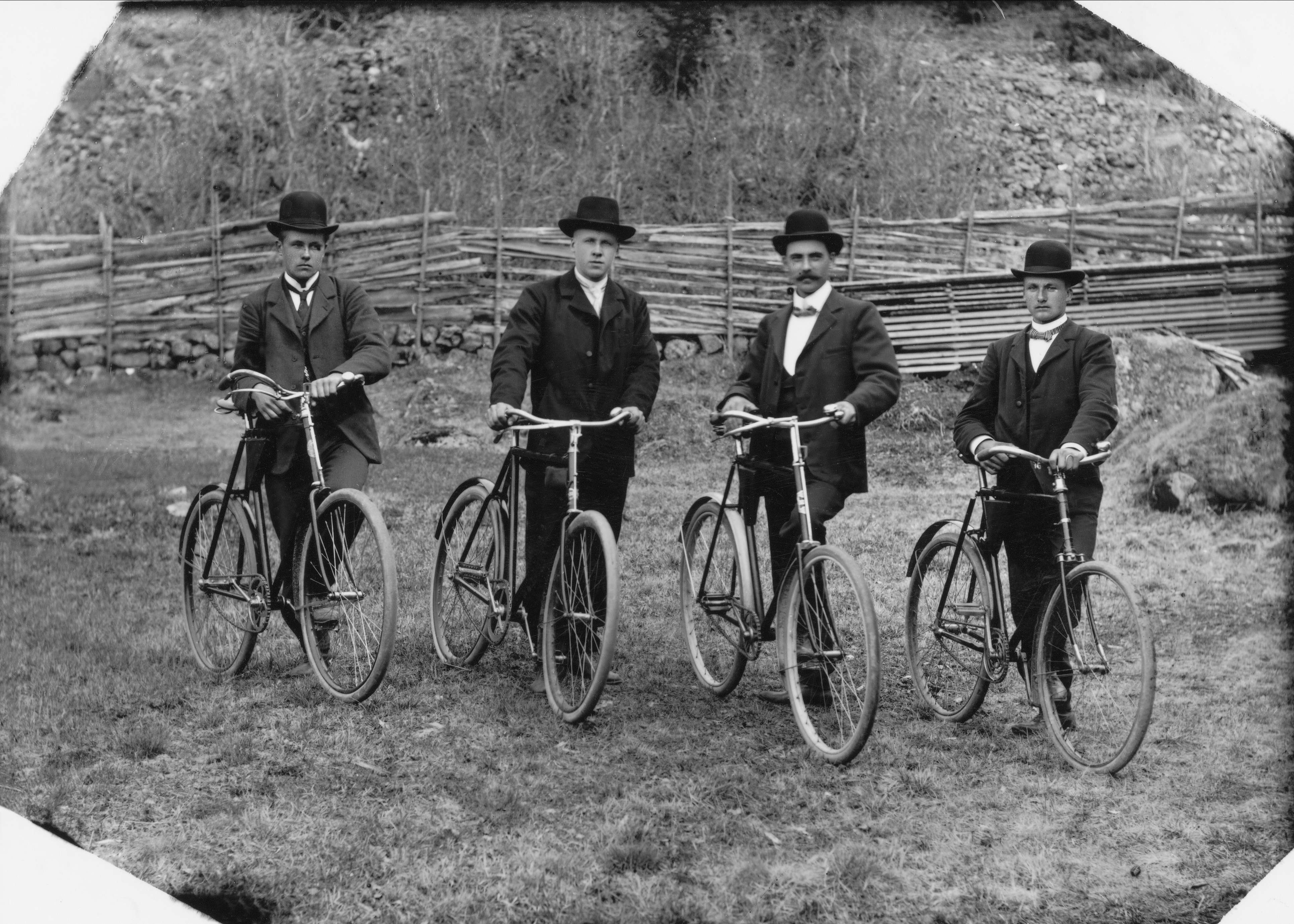 4 st cyklister poserar på en gräsplan med en gärdesgård i bakgrunden. NMA.0038339